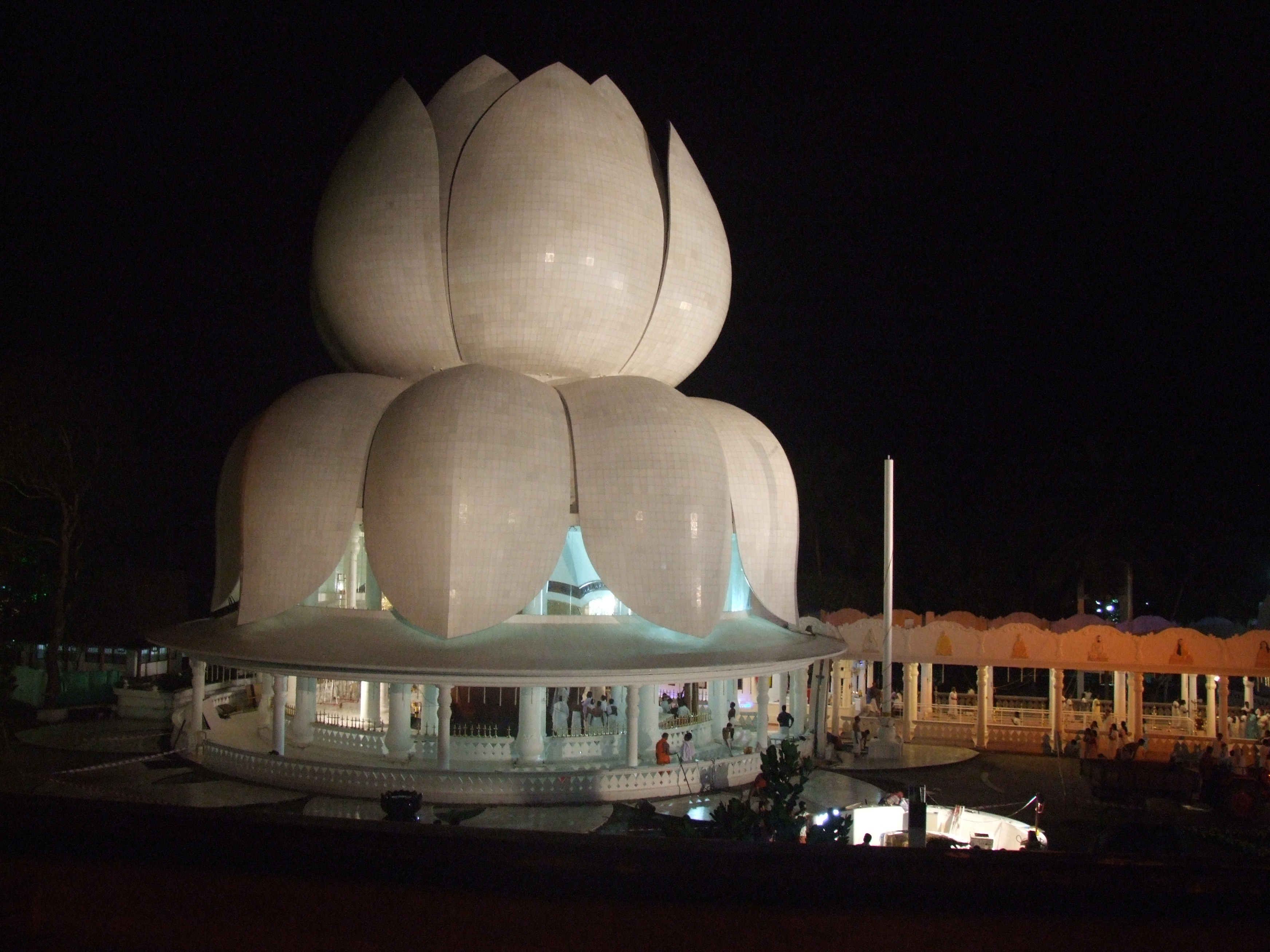 ശാന്തിഗിരി അശ്രമം,പർണ്ണശാല,2010 സെപ്തംബർ 12 ലോകത്തിനു തുറന്നു കൊടുത്തു